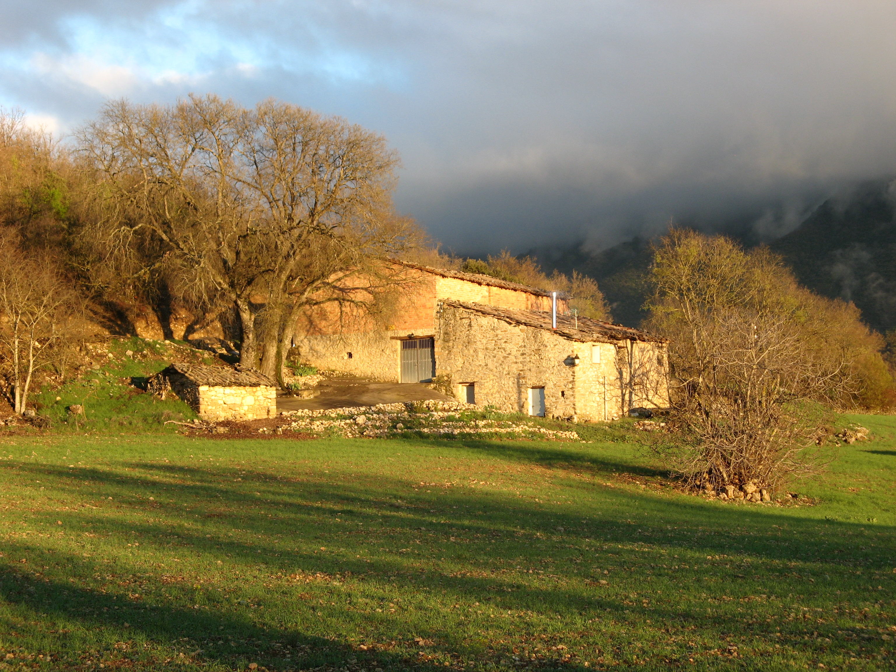 Mas de Bruquet